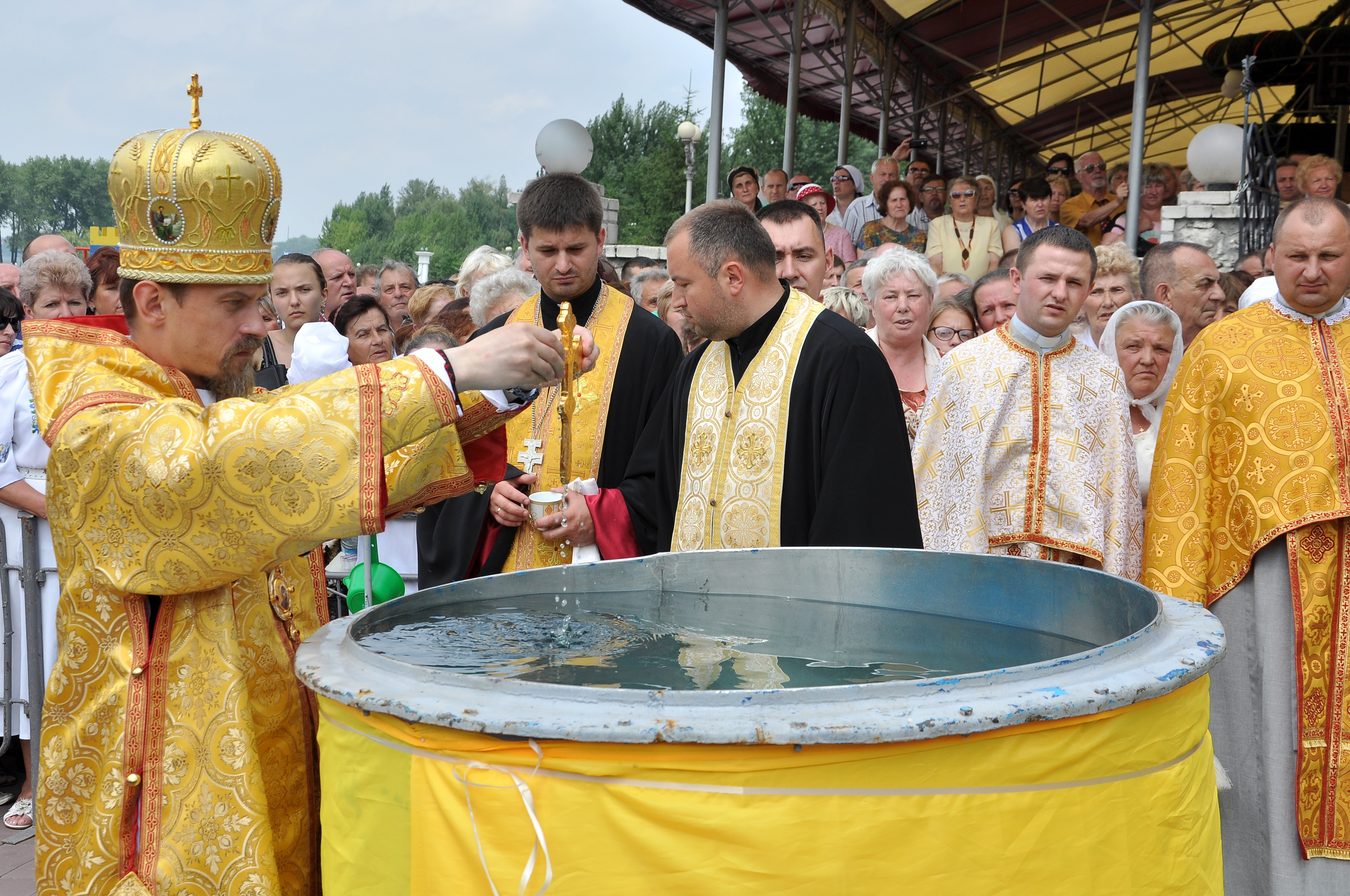 Молитовна хода «Стації митрополита Андрея», яка пройшла вулицями м. Тернополя 26 липня 2015 року на вшанування митрополита УГКЦ Андрея Шептицького. Єпископ-помічник Тернопільсько-Зборівський УГКЦ Теодор (Мартинюк) освячує воду.